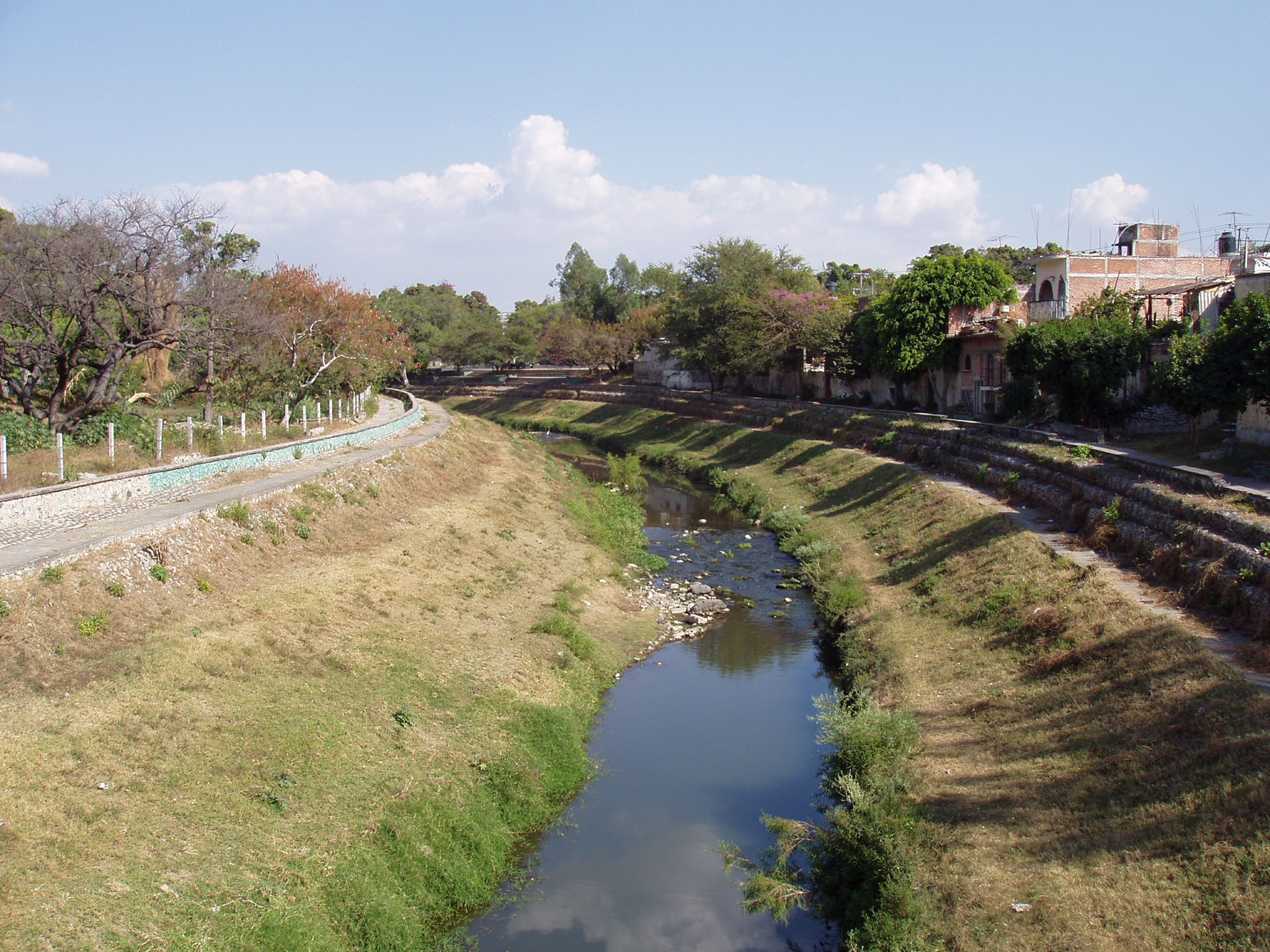 Fotografia del Rio Yautepec, en la localidad del Municipio de Yautepec de Zaragoza. Foto tomada sobre el Puente Nuevo